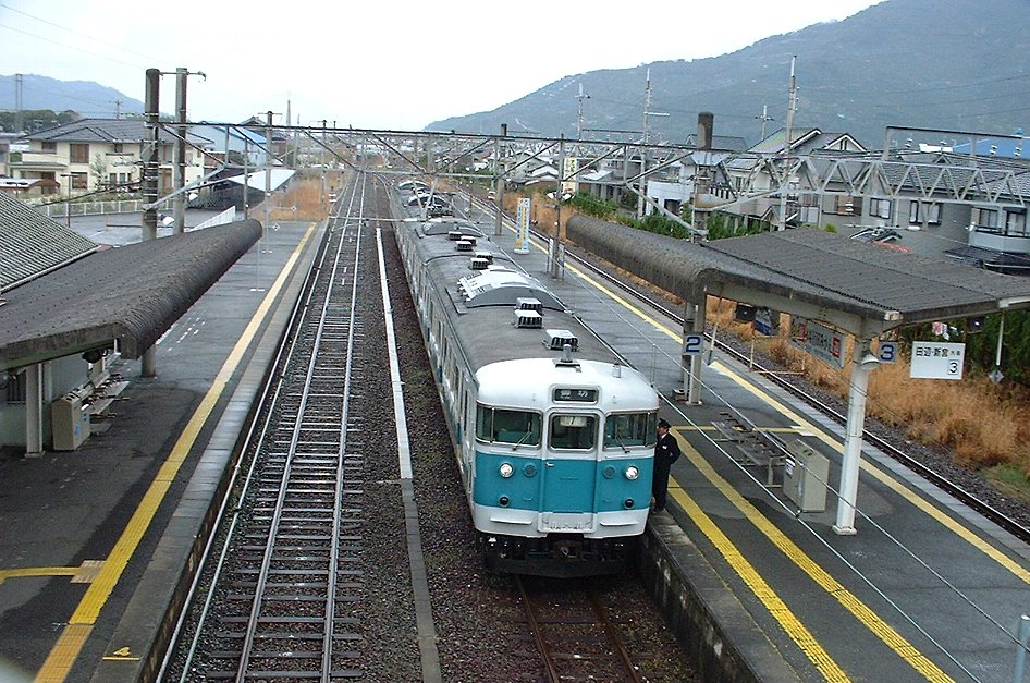 紀伊宮原駅 構内に阪和色113系が進入